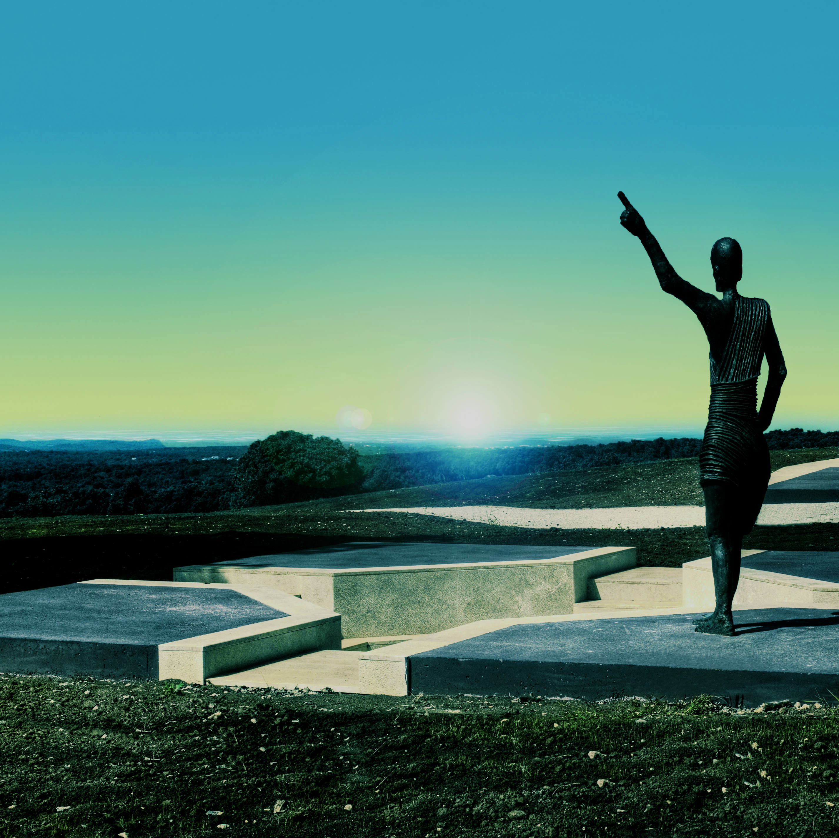 Eine permanente Skulpturen-Formation im öffentlichen Raum in Istrien - Westküste